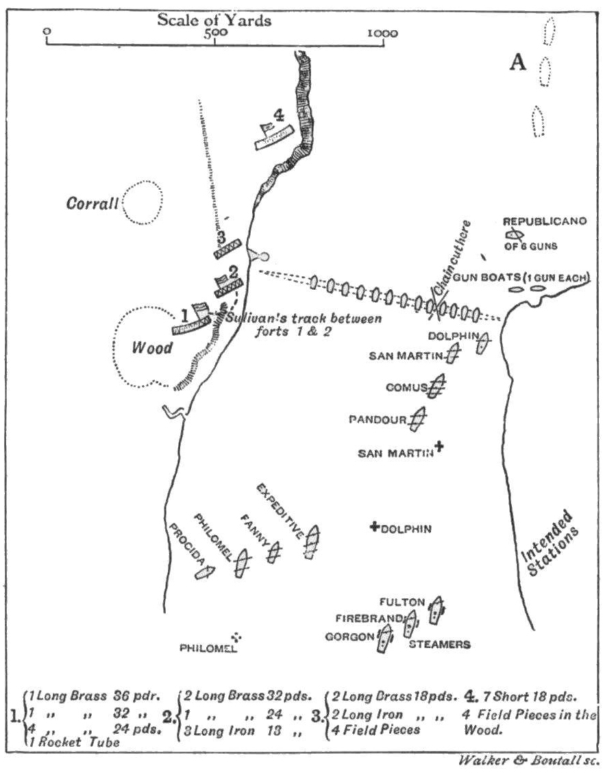 Plan du combat naval de l'Obligado, 20 novembre 1845 selon l'Amiral sir Bartholomew Sulivan (1810–1890) commandant de la flotte britannique lors de la bataille